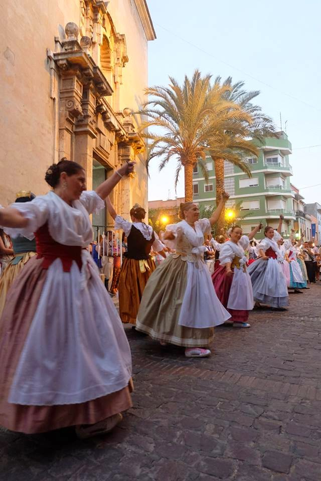 Dansà de la Mare de Déu d'Albalat